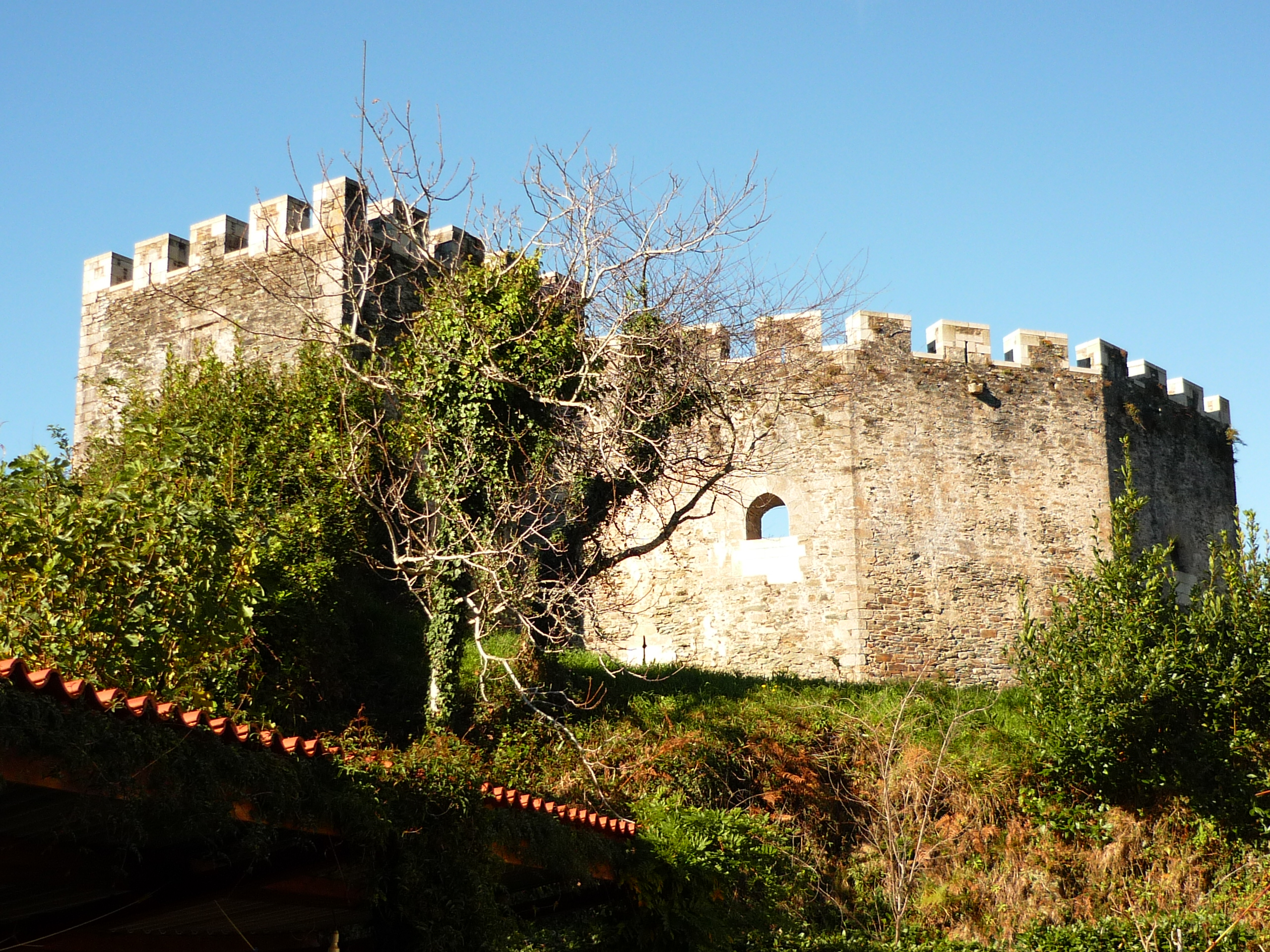 NO Concello do mesmo nome (provincia de A Coruña) NO Concello do mesmo nome (provincia de A Coruña)